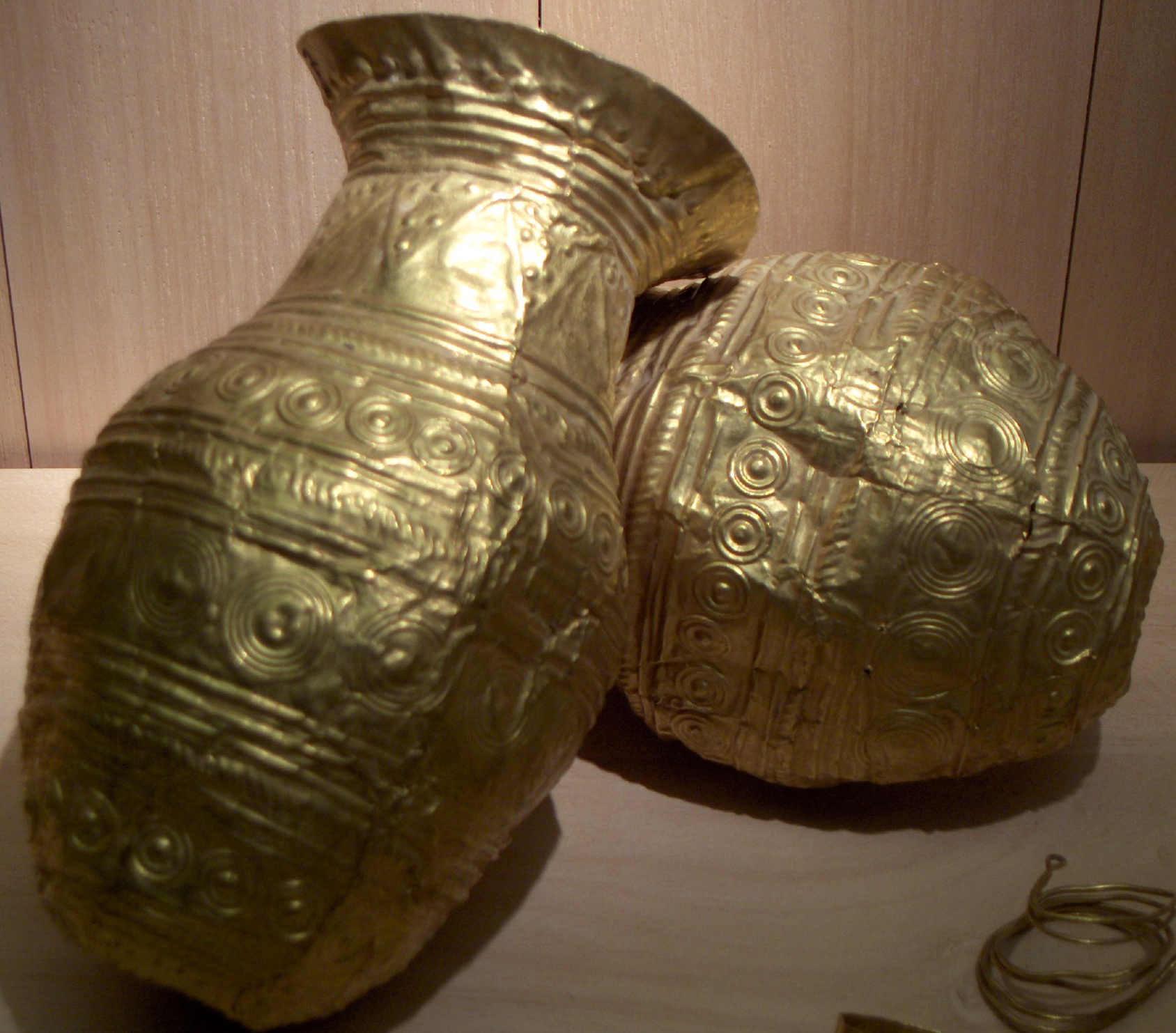 Vase, or, âge du bronze, 1600/1300 avant J.-C, provenance : Villeneuve-Saint-Vistre (Marne), musée des antiquités nationales, Saint-Germain-en-Laye